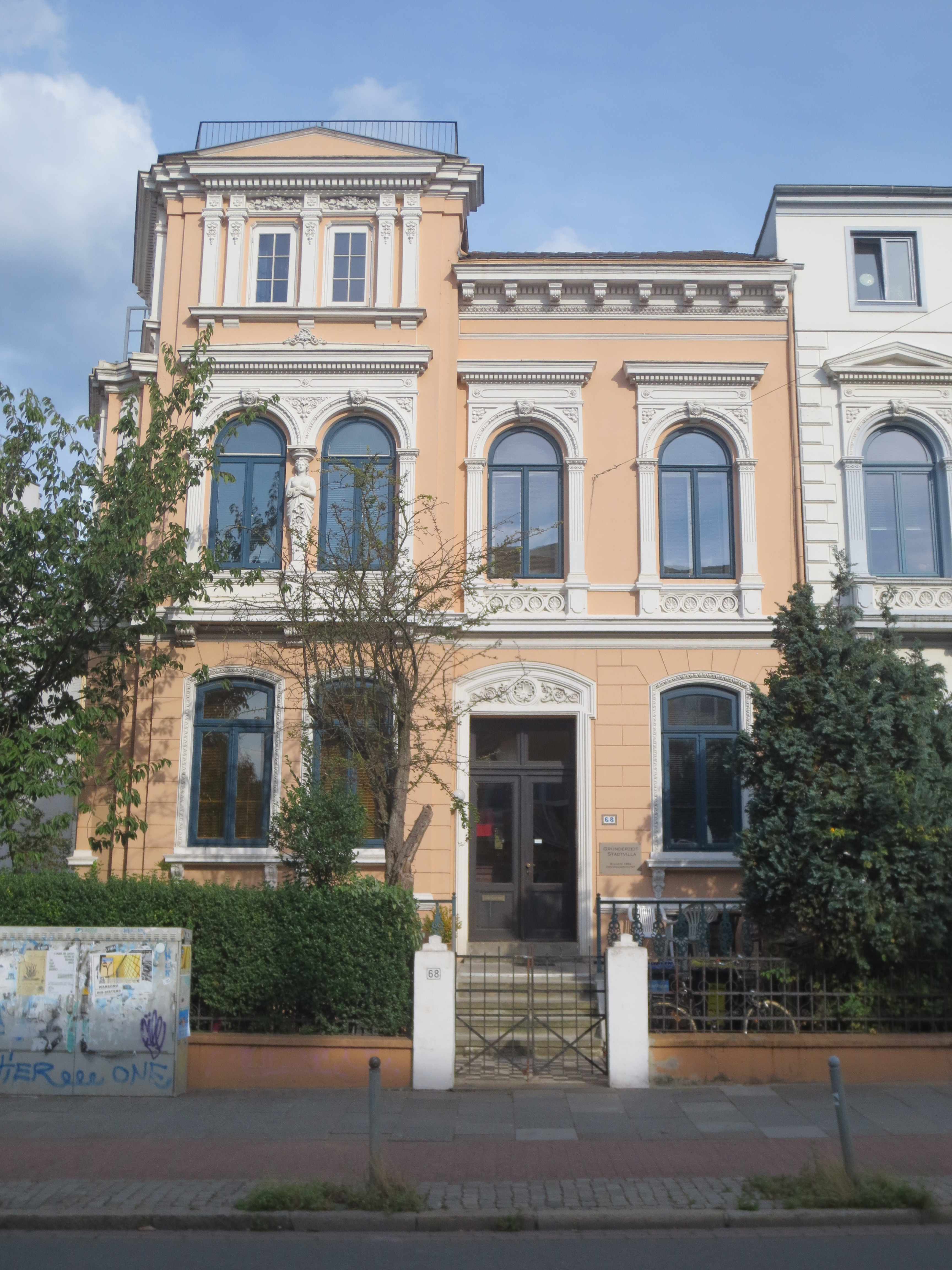 Wohnhaus in Bremen, Sielwall 68Das abgebildete Objekt ist ein geschütztes Kulturdenkmal in der Freien Hansestadt Bremen, mit der Nr. 1137 beim Landesamt für Denkmalpflege registriert.